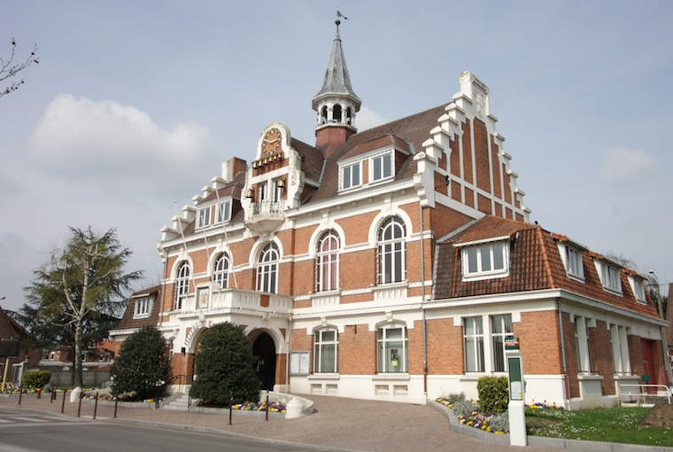 la mairie de quesnoy sur deule